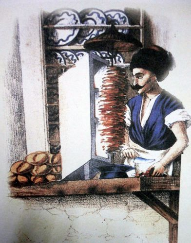 1850 yılına ait bir döner ustası çizimi.